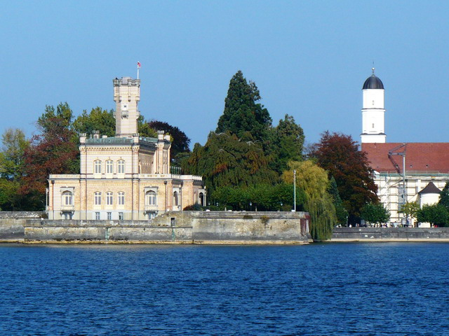 Blick auf Schloss Montfort und die Pfarrkirche St. Martin in Langenargen vom Bodensee aus